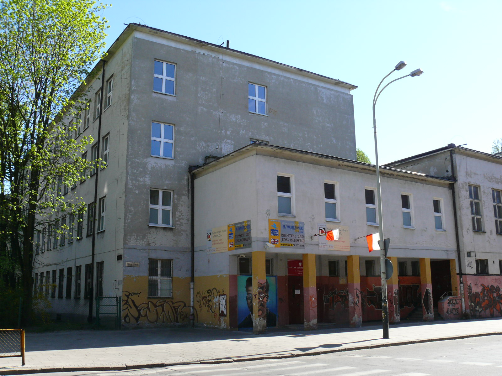 XXI Liceum Ogólnokształcące im. Bolesława Prusa przy ul. Kopernika 2 w Łodzi